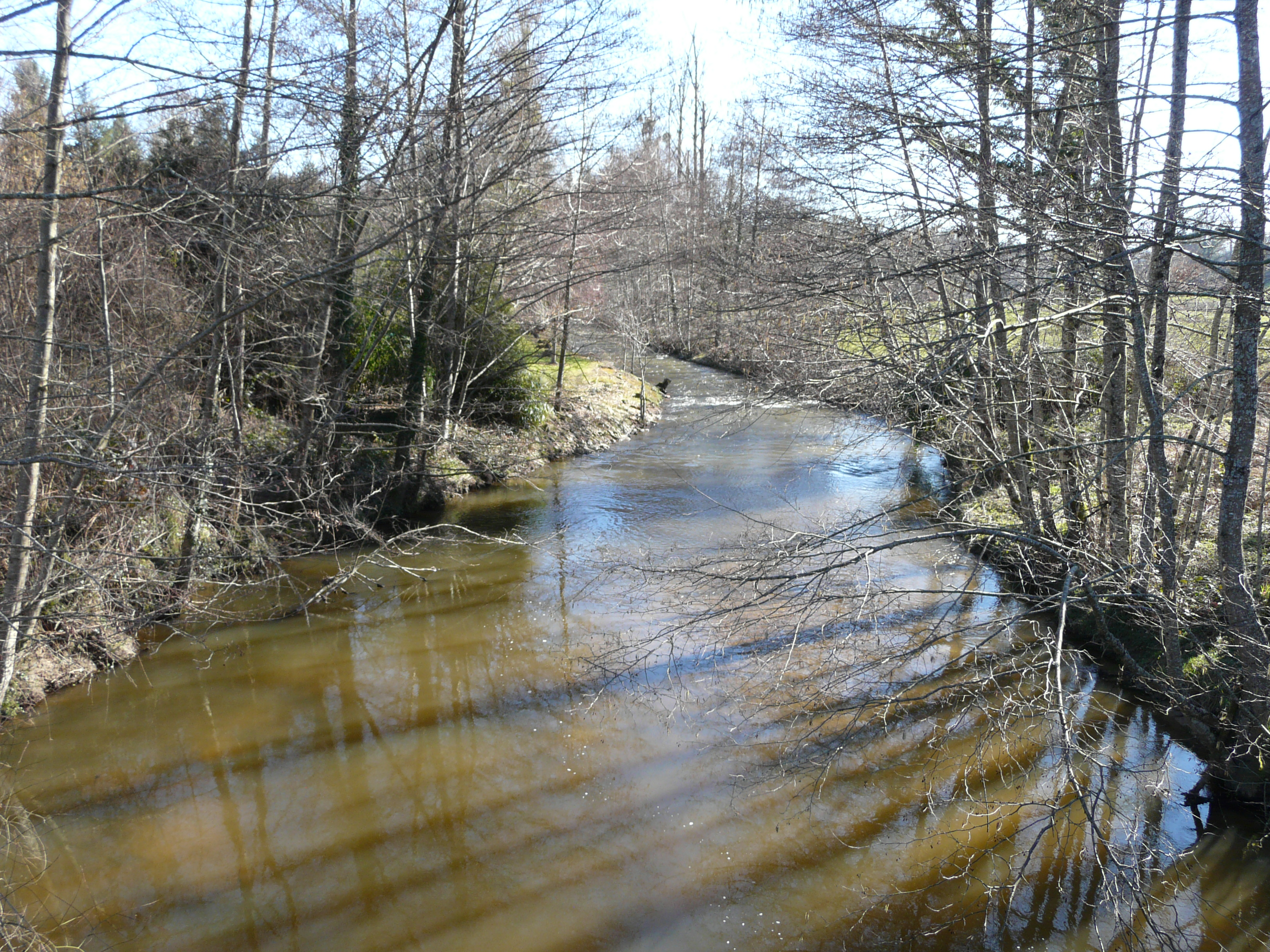 La Loue en aval de la route départementale 81E2, près du moulin du Pont, Sarlande, Dordogne, France.